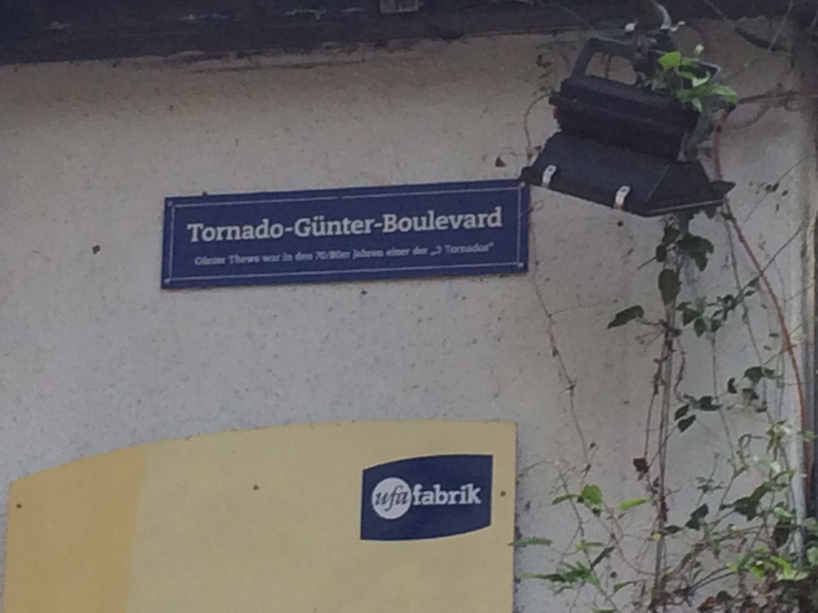 UFA-Gelände